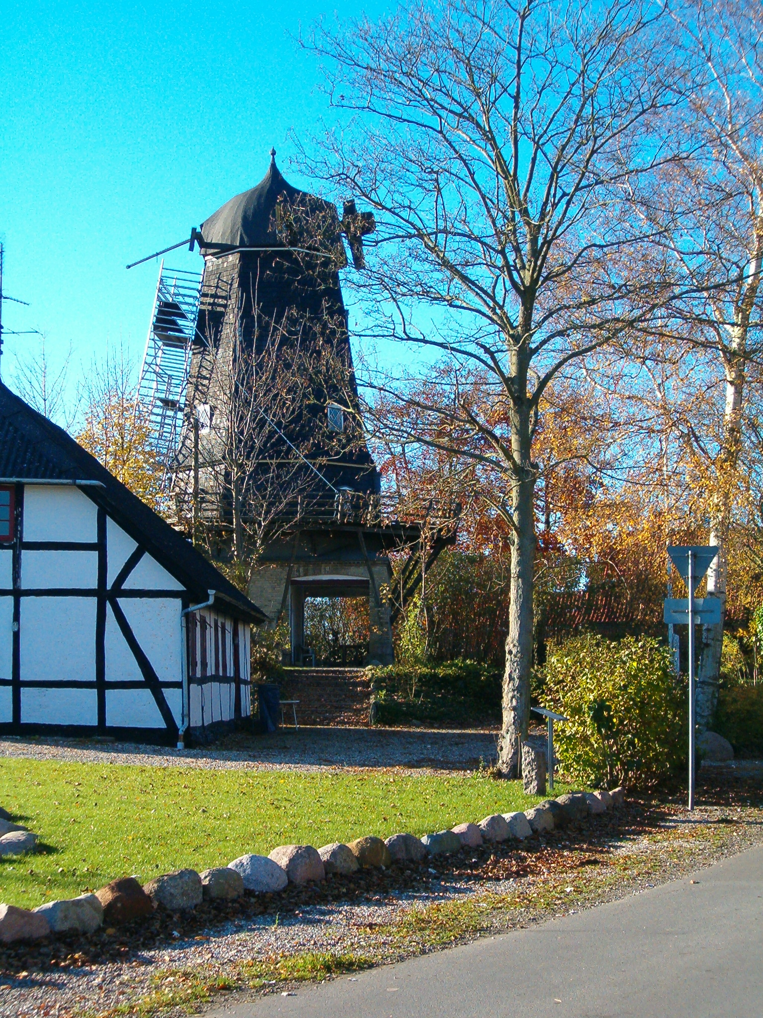 Billede af Kettinge Mølle i landsbyen kettinge på Lolland i Danmark (Windmill from Kettinge/Lolland/Denmark)